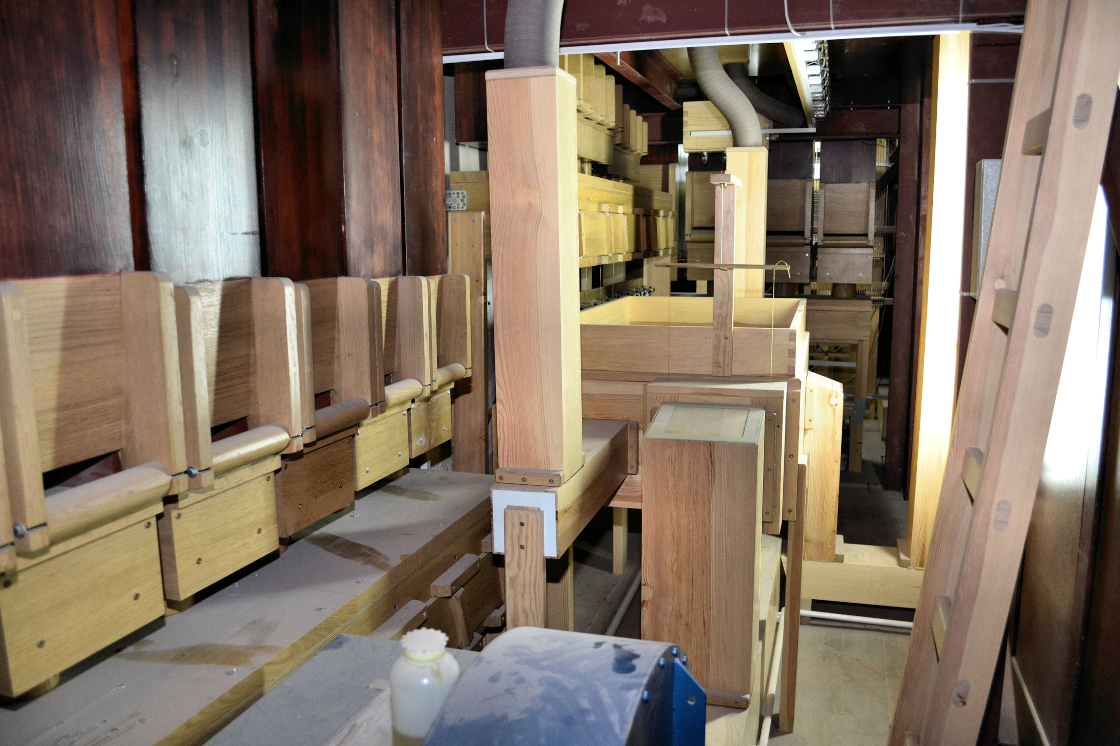 Bazylika archikatedralna św. Jakuba w Szczecinie - organy